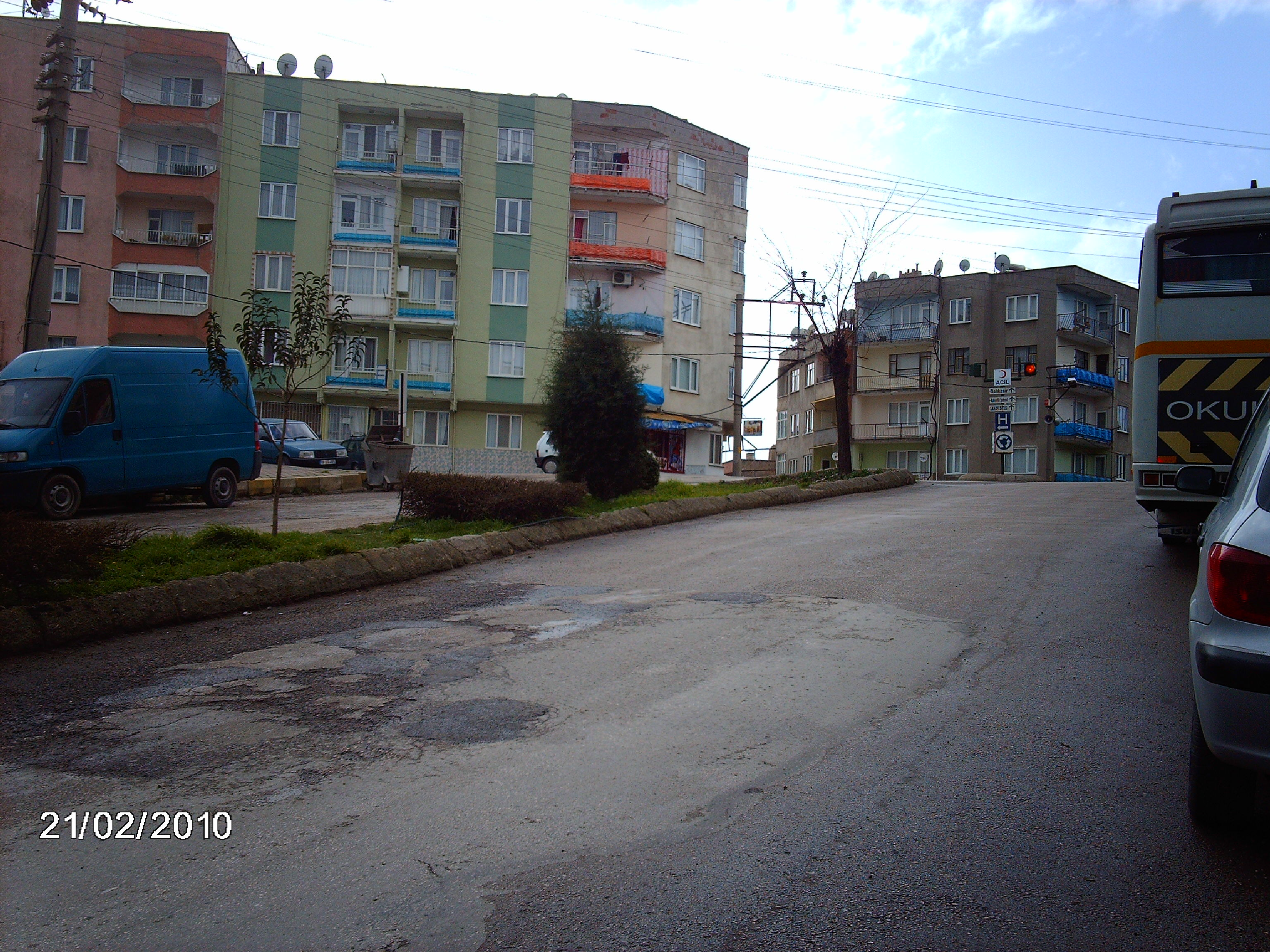 TEKEL BAYIRI SARI SOKAK ÖNÜ